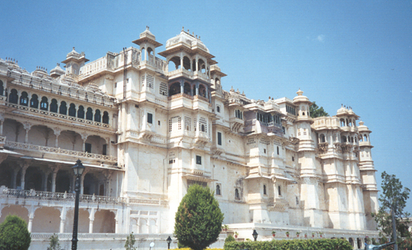 Stadtpalast von Udaipur, Rajasthan